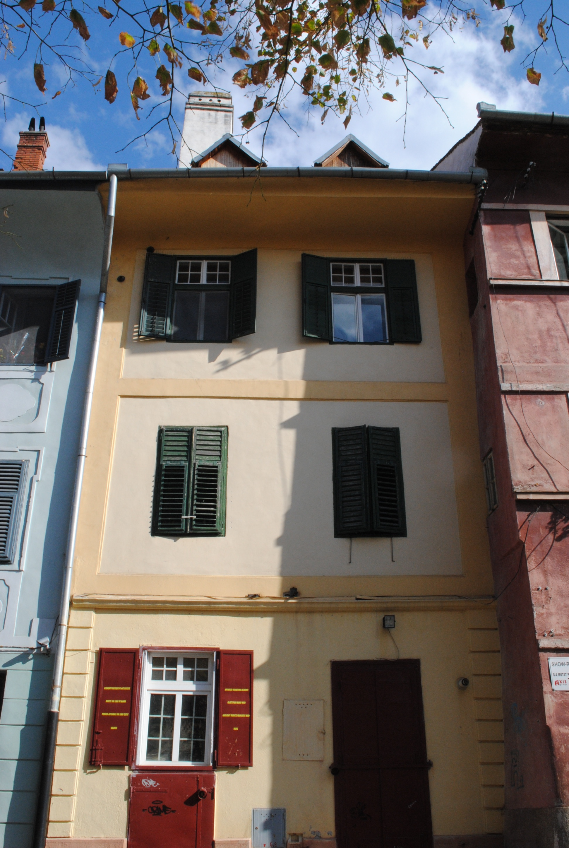 Casă, sec. XV - XVI, sf. sec. XVIII